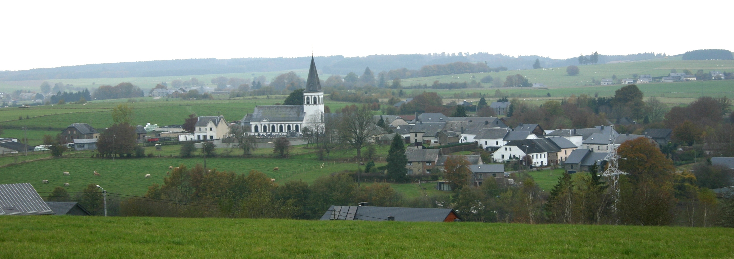 Nives am Hierscht 2007.